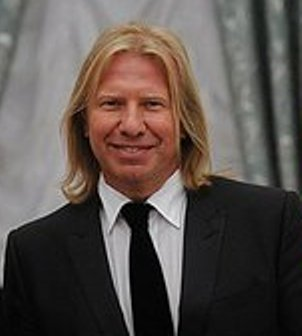 Почётное звание «Заслуженный артист Российской Федерации» присвоено Виктору Дробышу